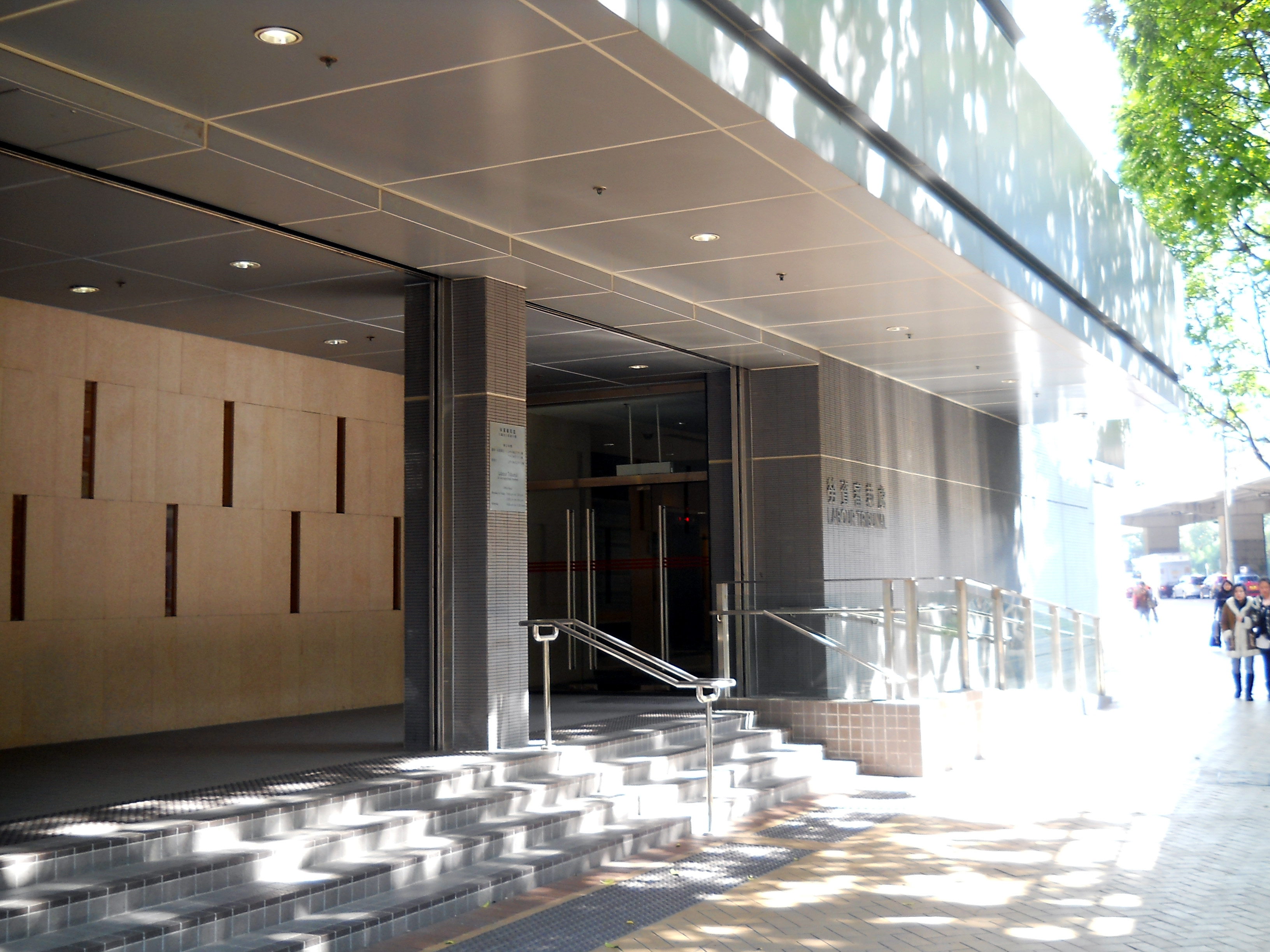 中文（香港）: 香港勞資審裁處